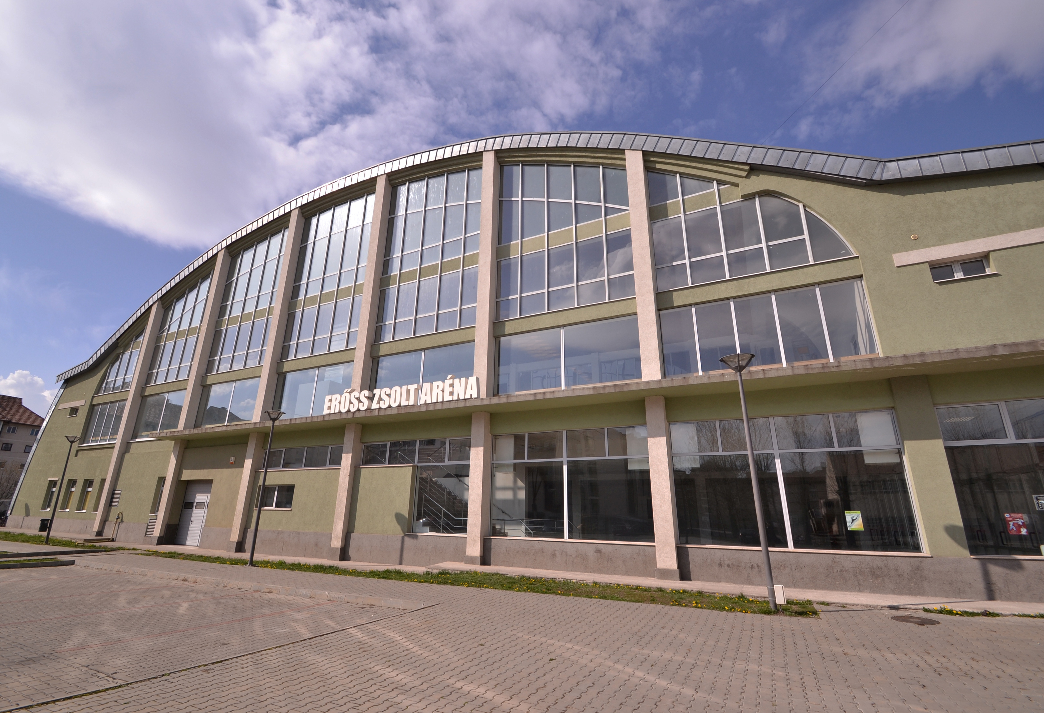 sportcsarnok